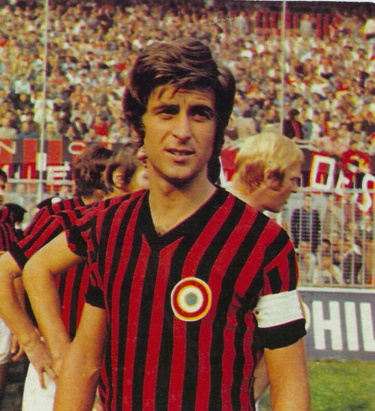 Снимката е от 22 април 1941. Авторското право е изтекло.